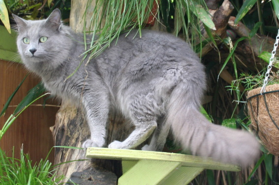 Nebelung Male, Aleksandr van Song de Chine.JPG